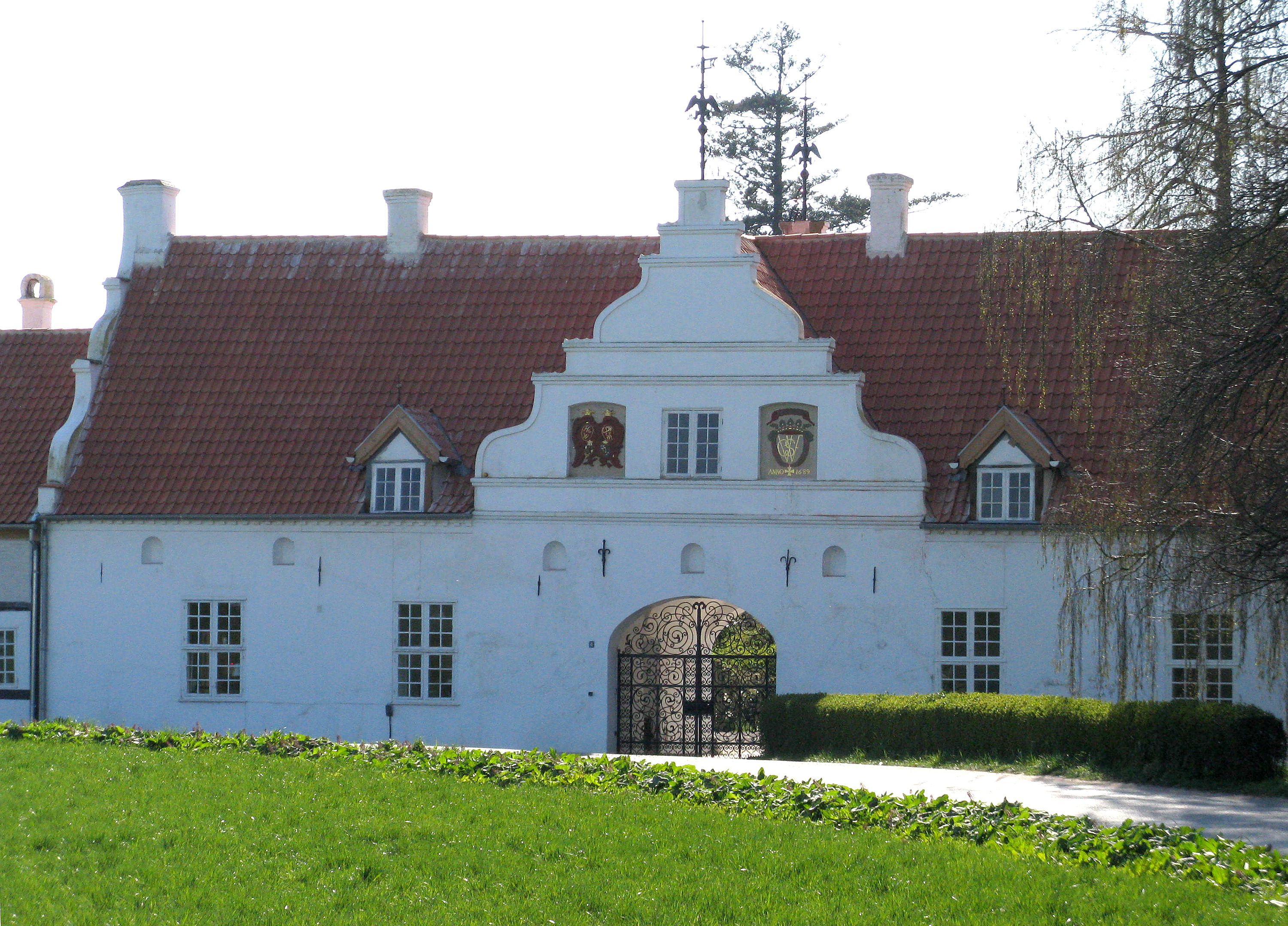 Porthus ved Wedellsborg på vestfyn, Denmark